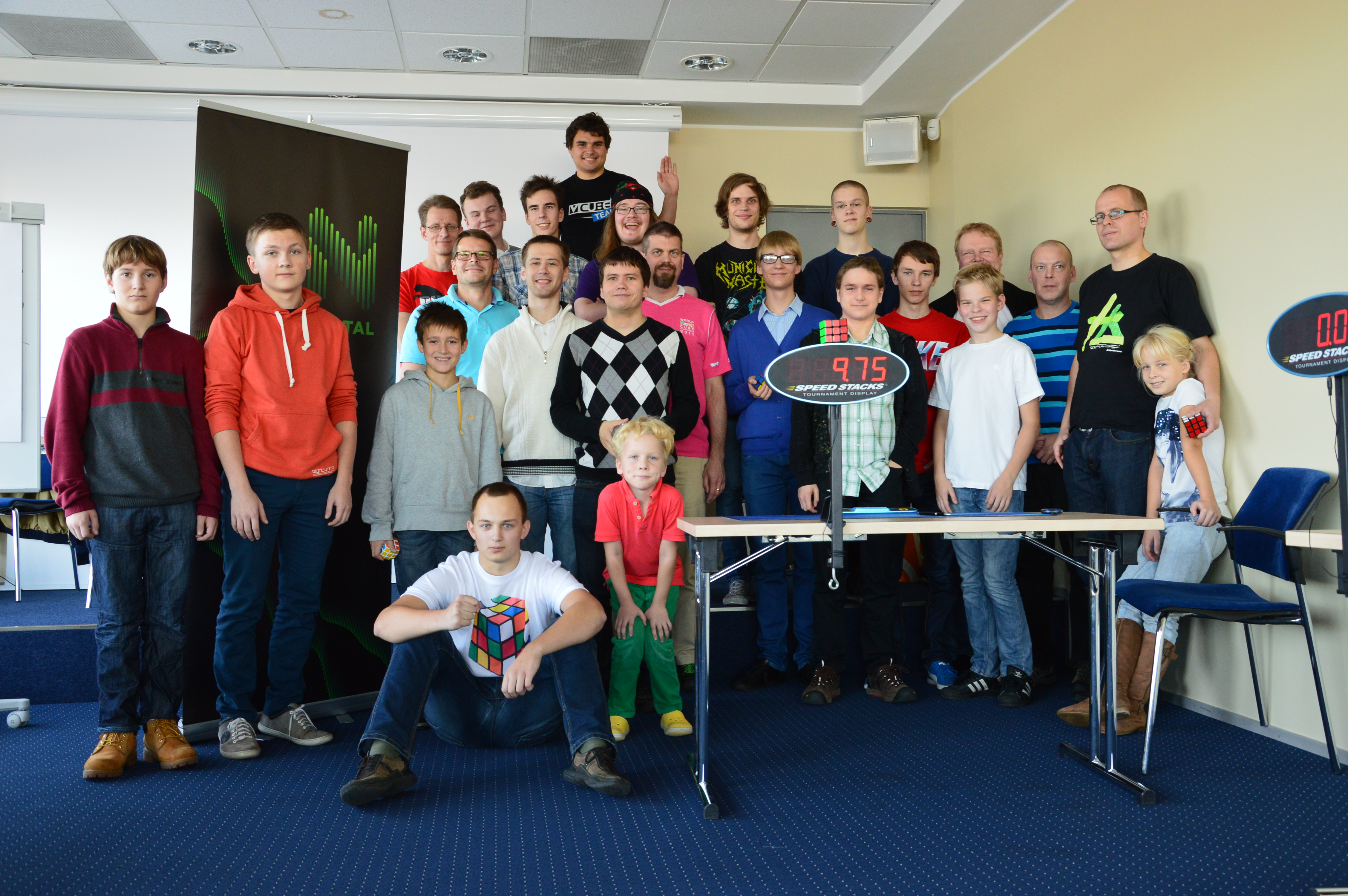 Estonian Open 2013 võistlusest osavõtjad.